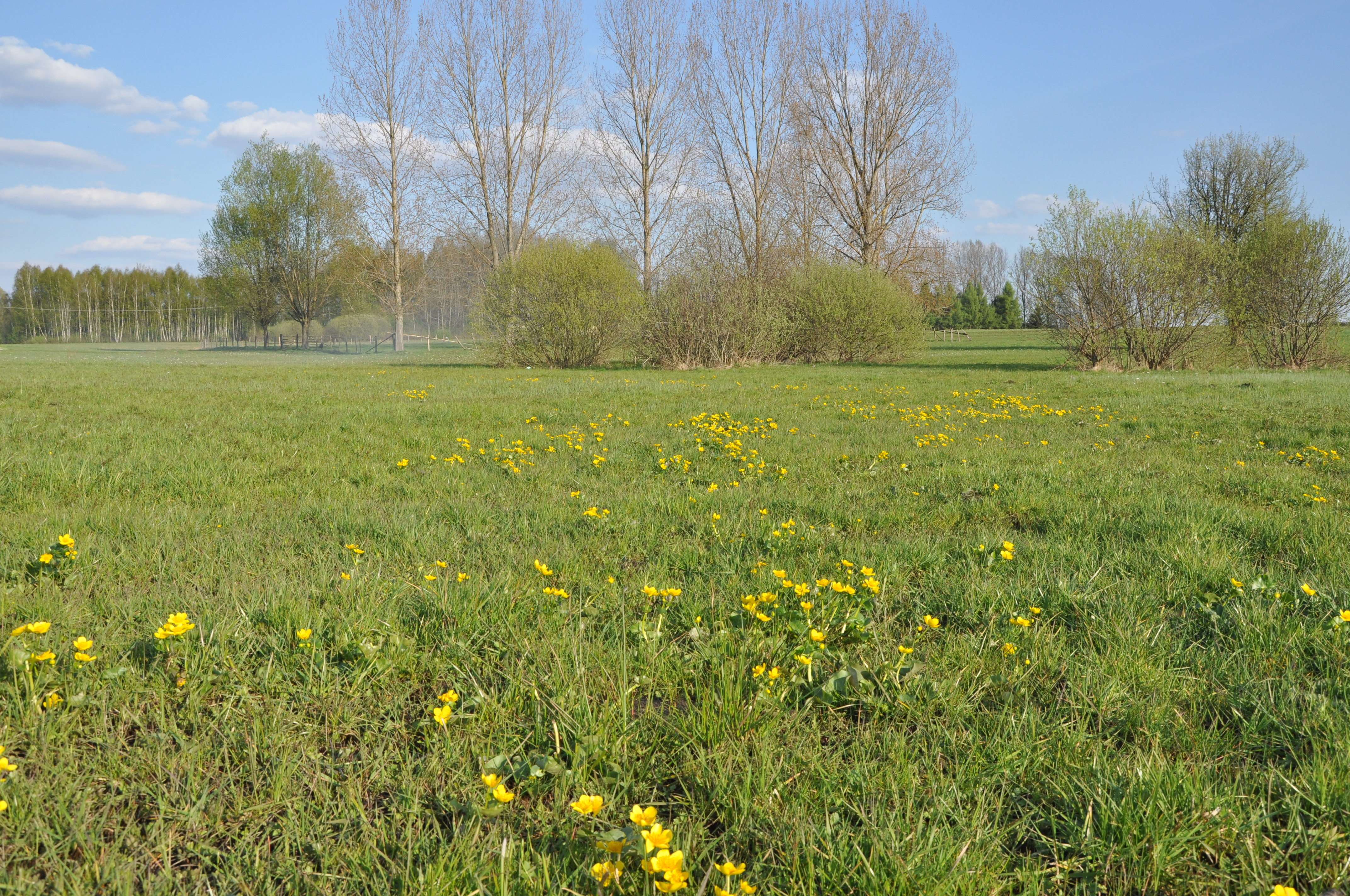 Pietrusin, łąki i pastwiska.